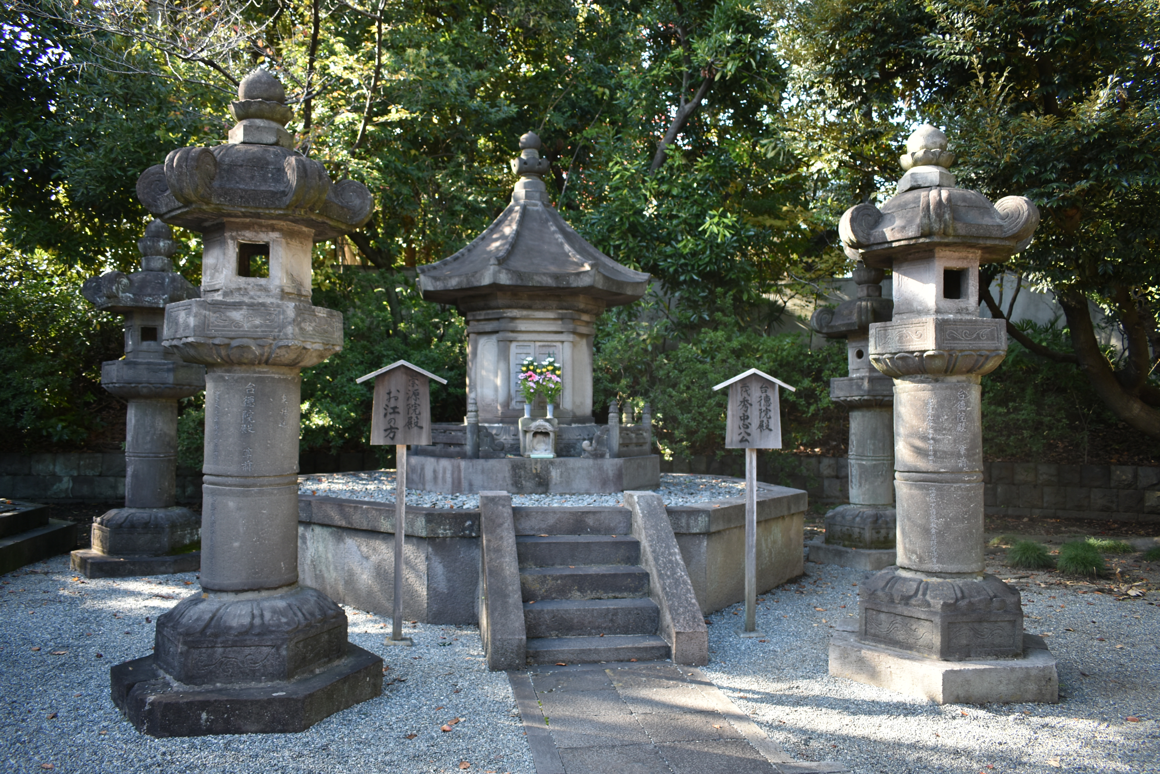 増上寺 御霊屋